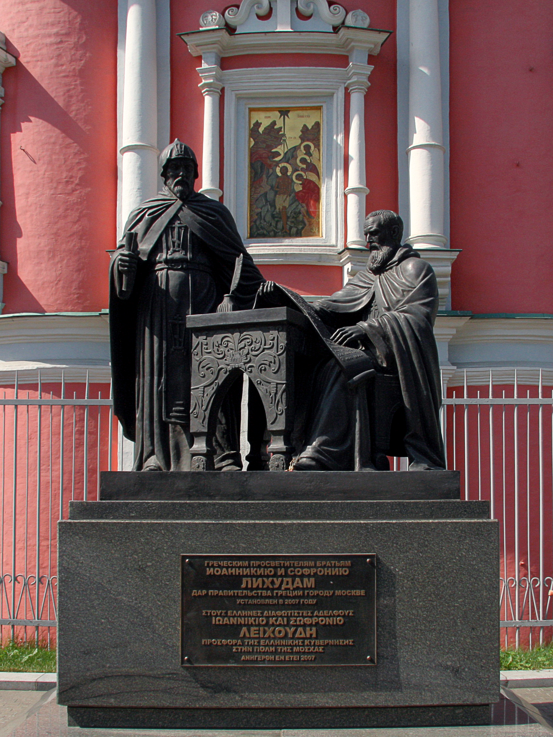 Памятник Иоанникию и Софронию Лихудам. Установлен в Богоявленском переулке в городе Москве в 2007 году